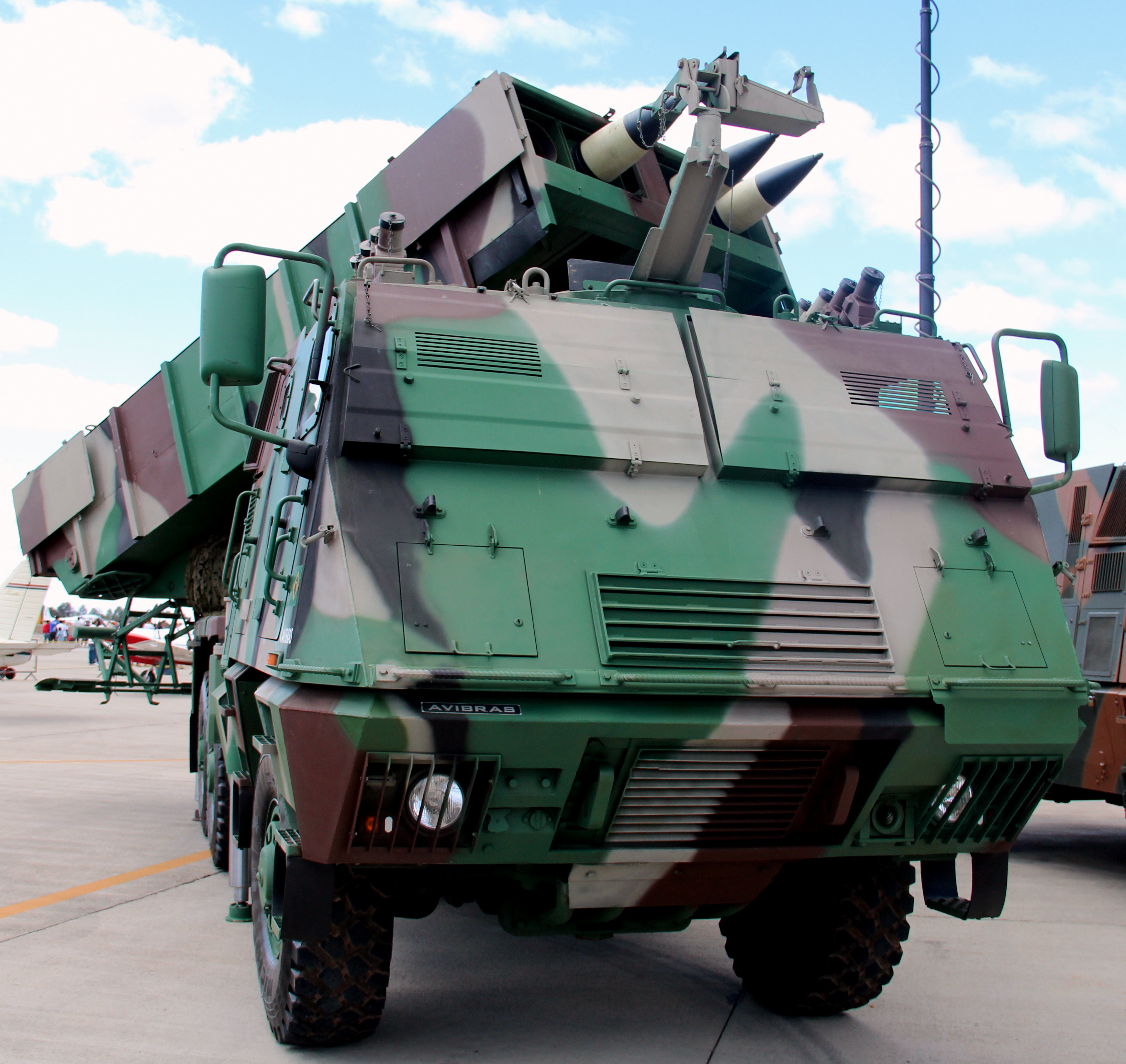 Exército Brasileiro